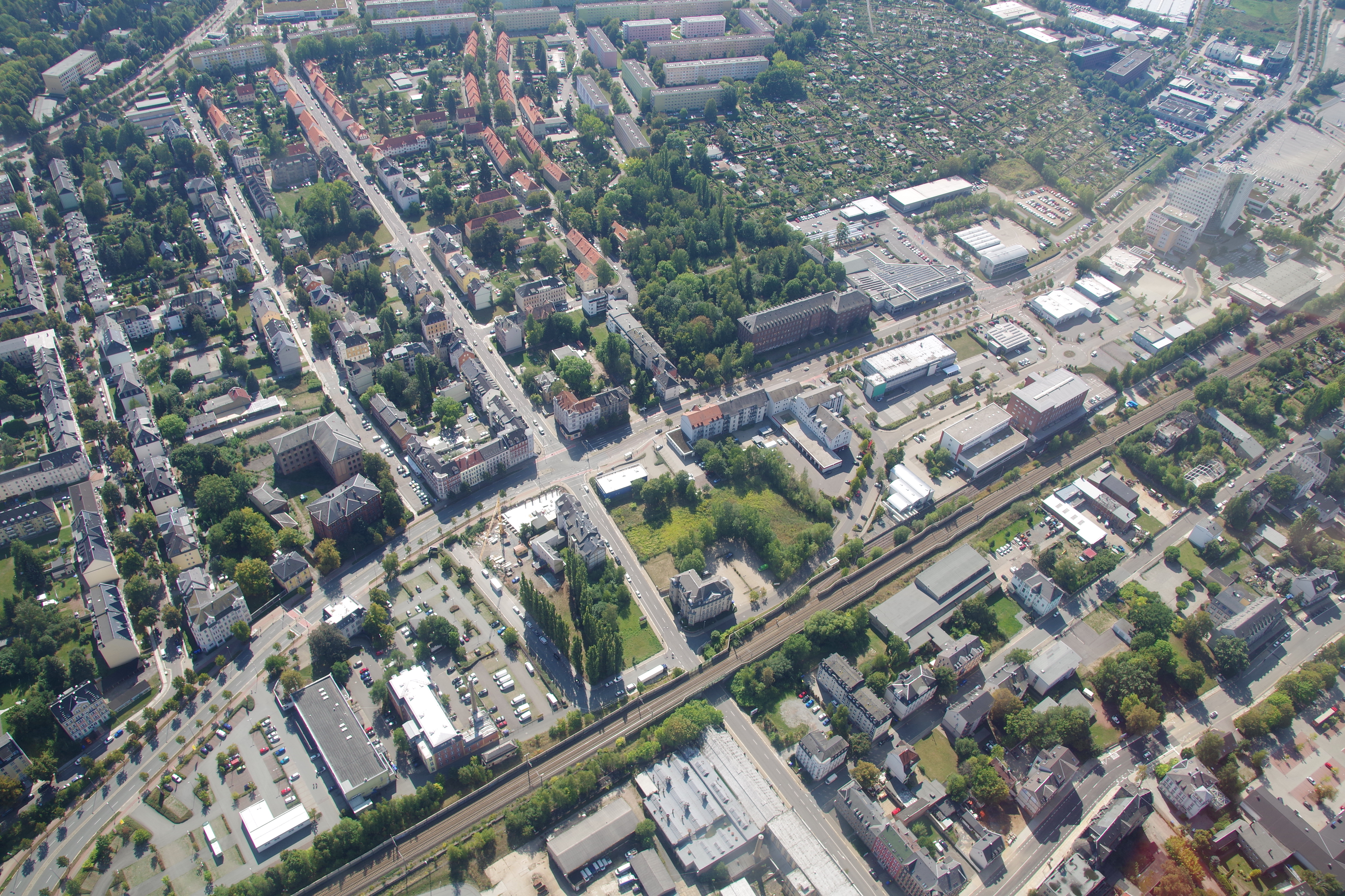 Luftaufnahme des Chemnitzer Stadtteils Kappel